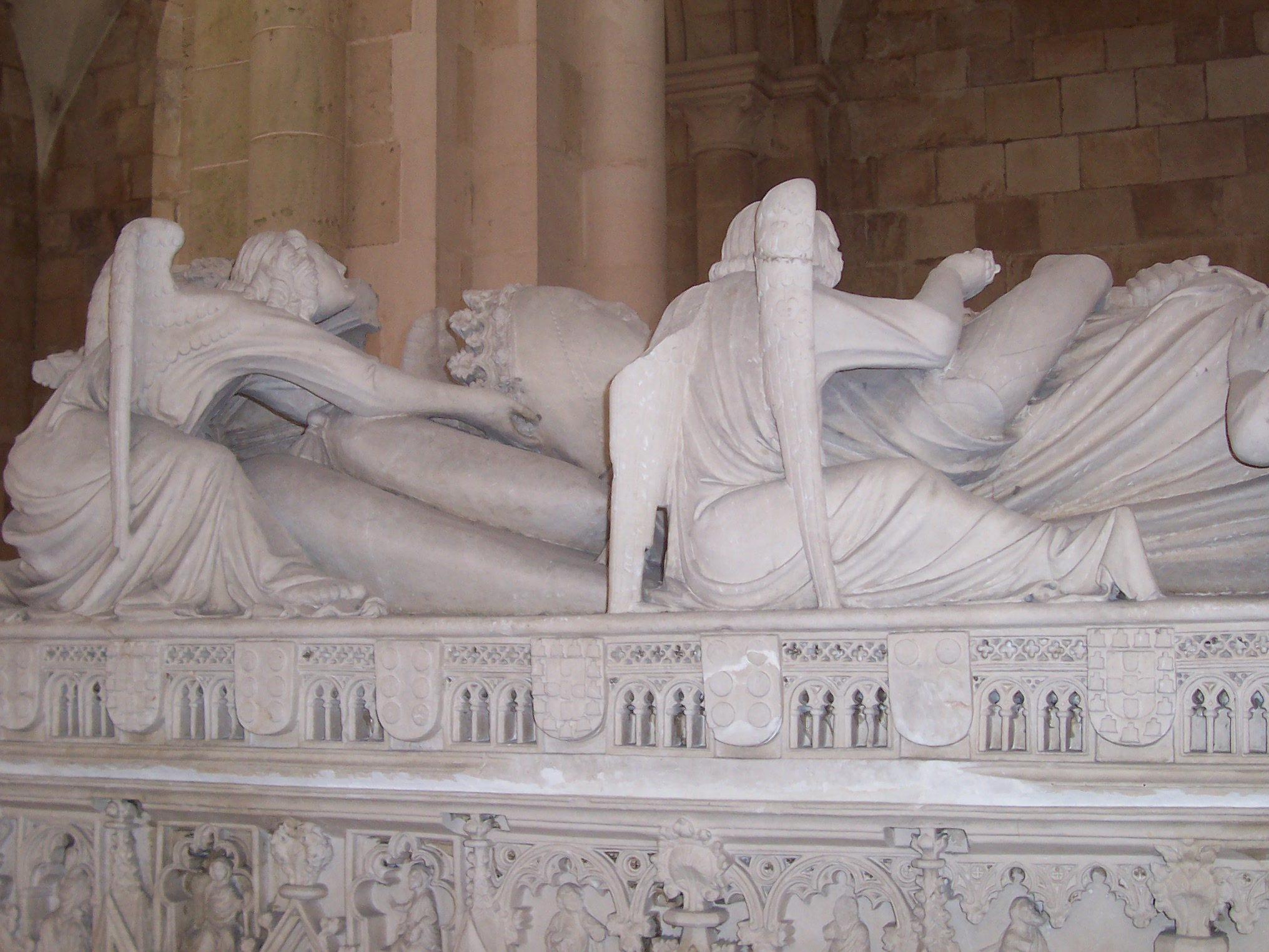 Túmulo de Inês de Castro